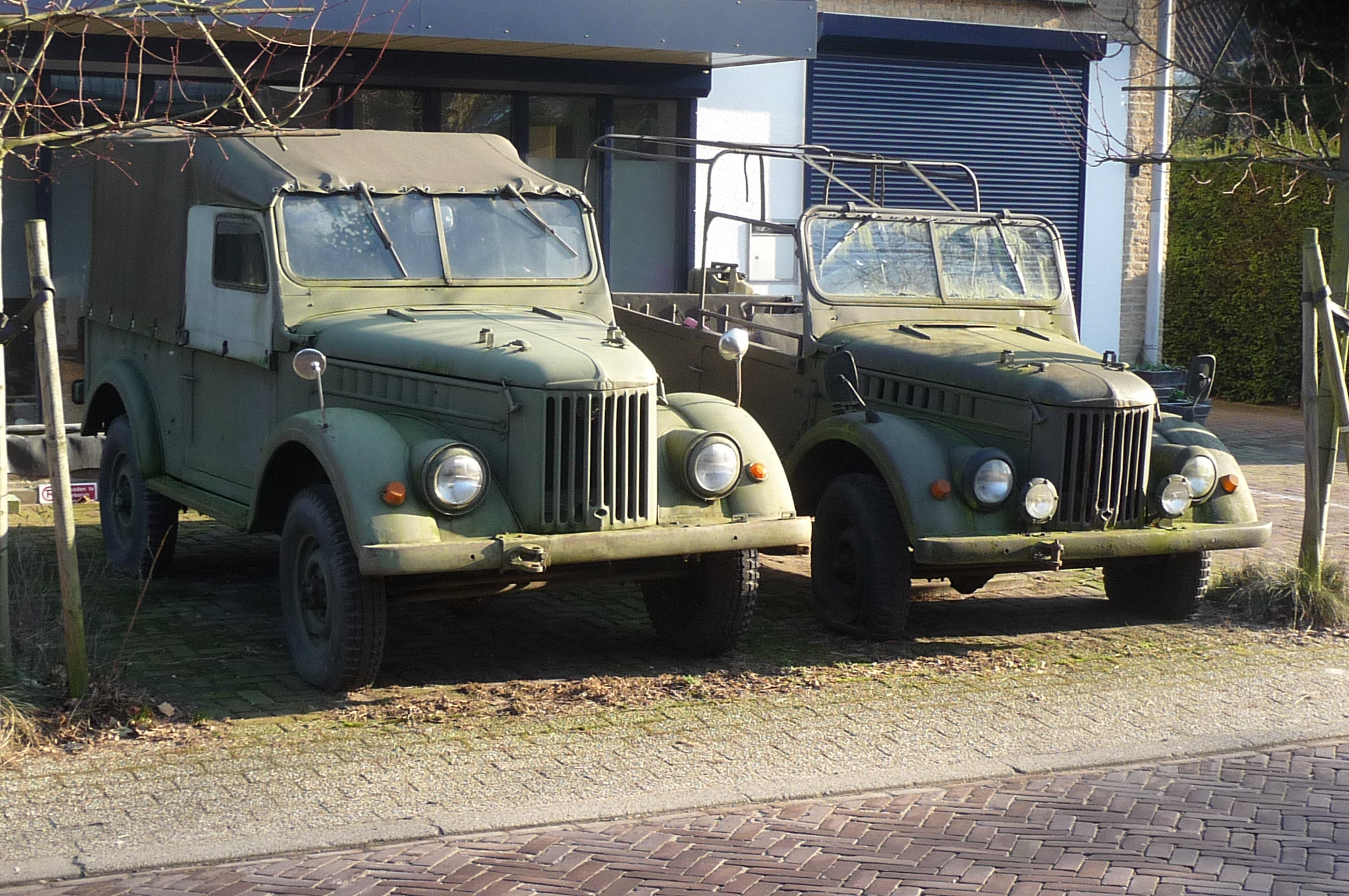 GAZ 69 (2x)